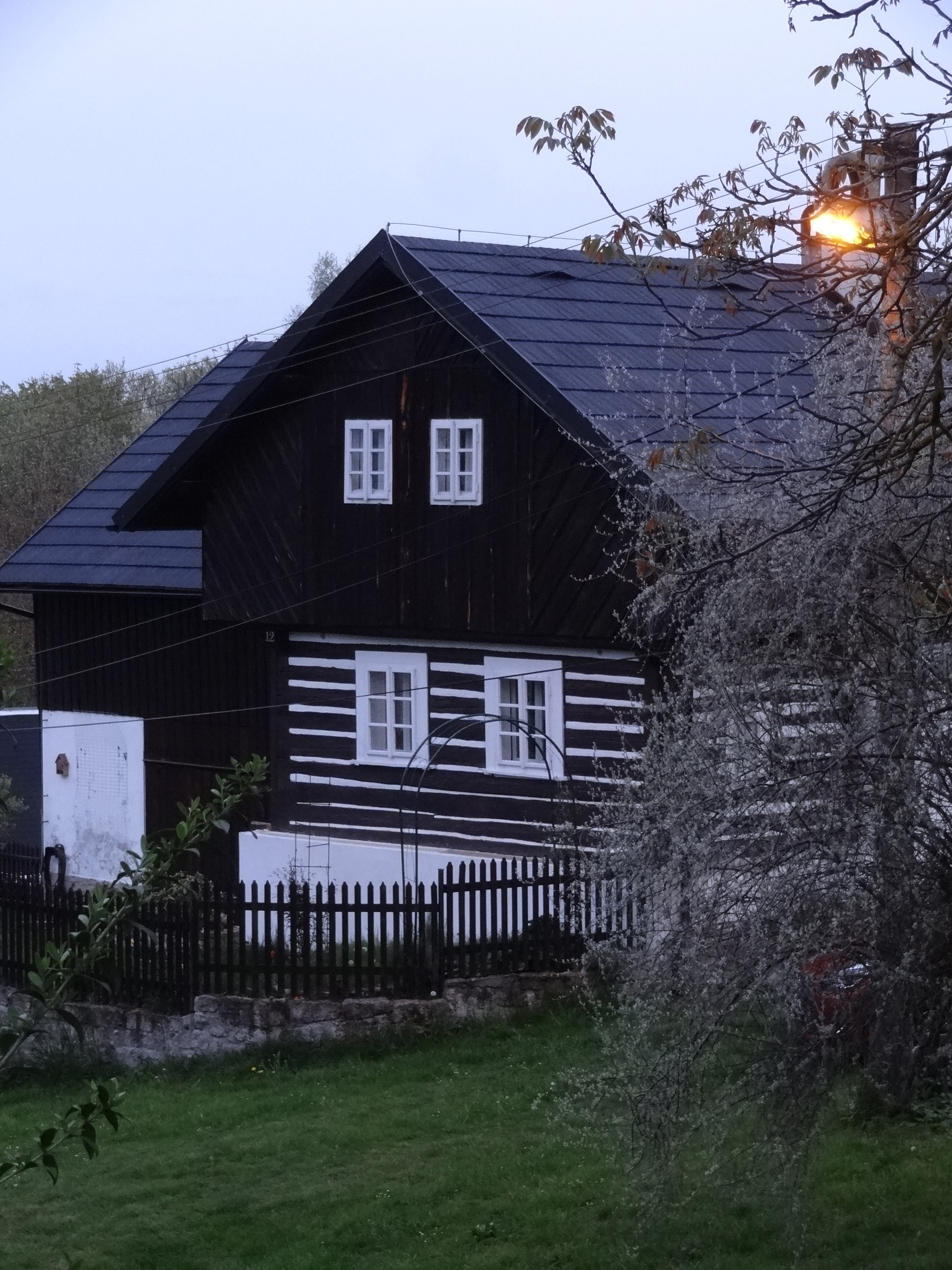 Neveklovice - čp. 12